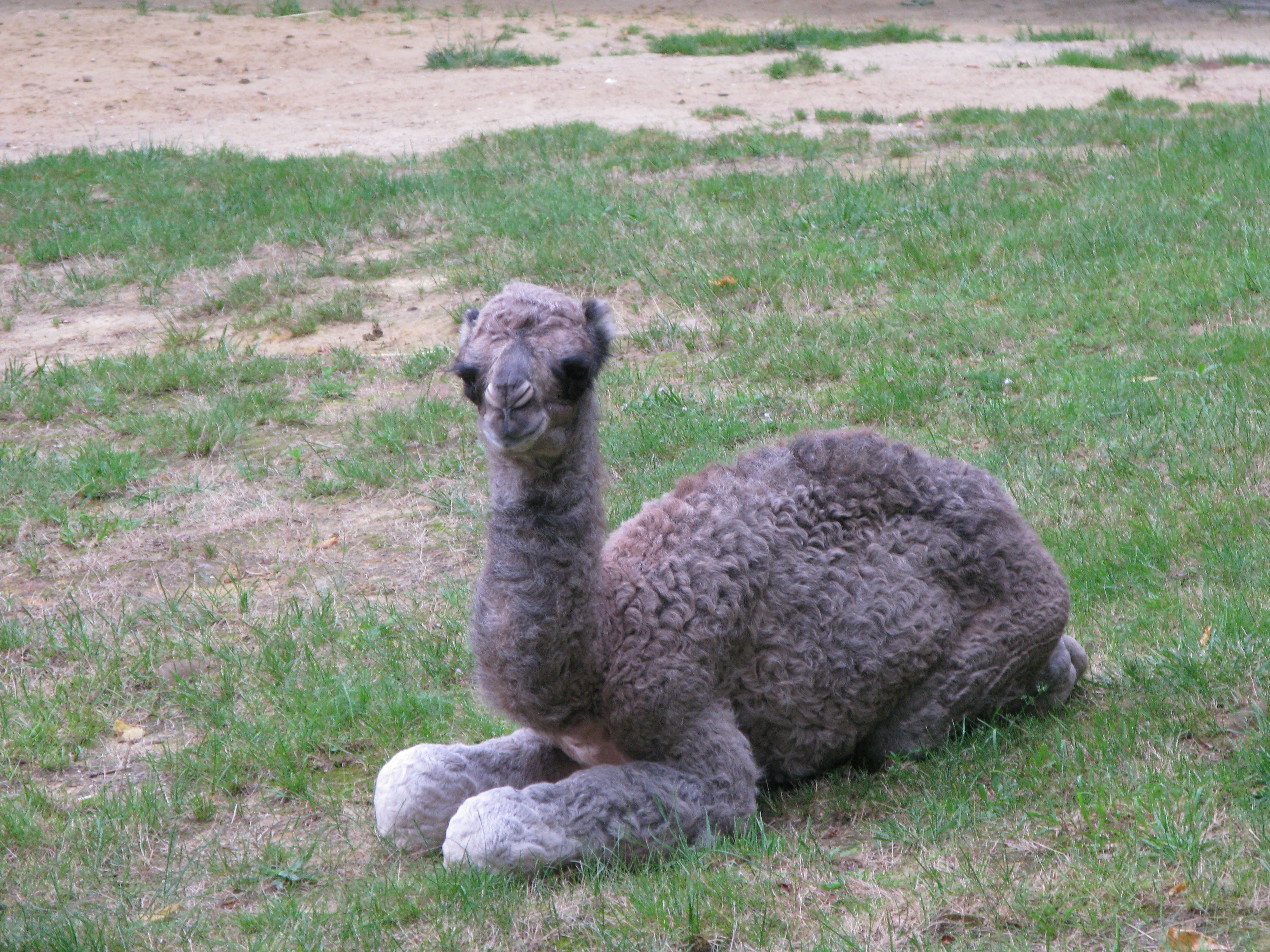 Jeune dromadaire (camelus dromedarius), à la ménagerie du Jardin des plantes de Paris.